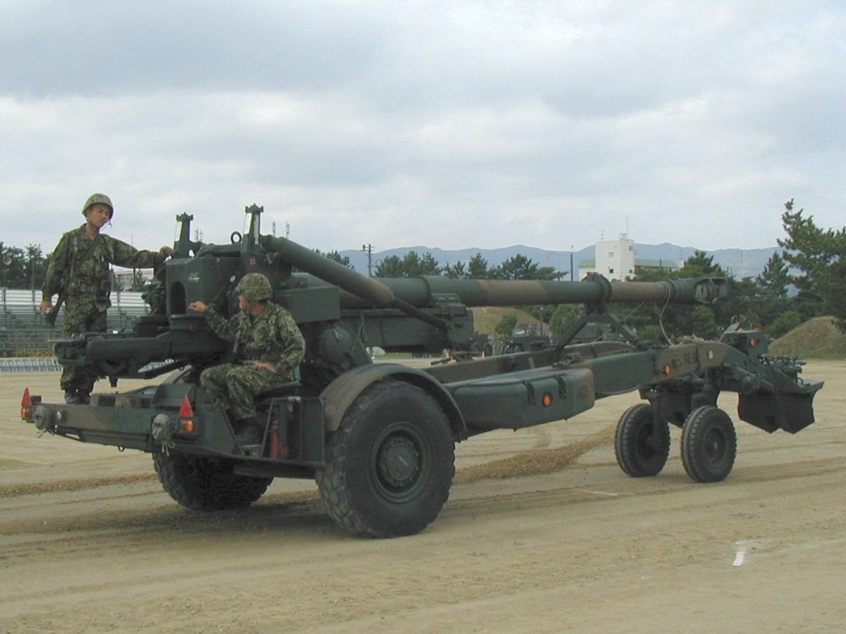 FH70 JGSDF Howitzer(155mm榴弾砲)